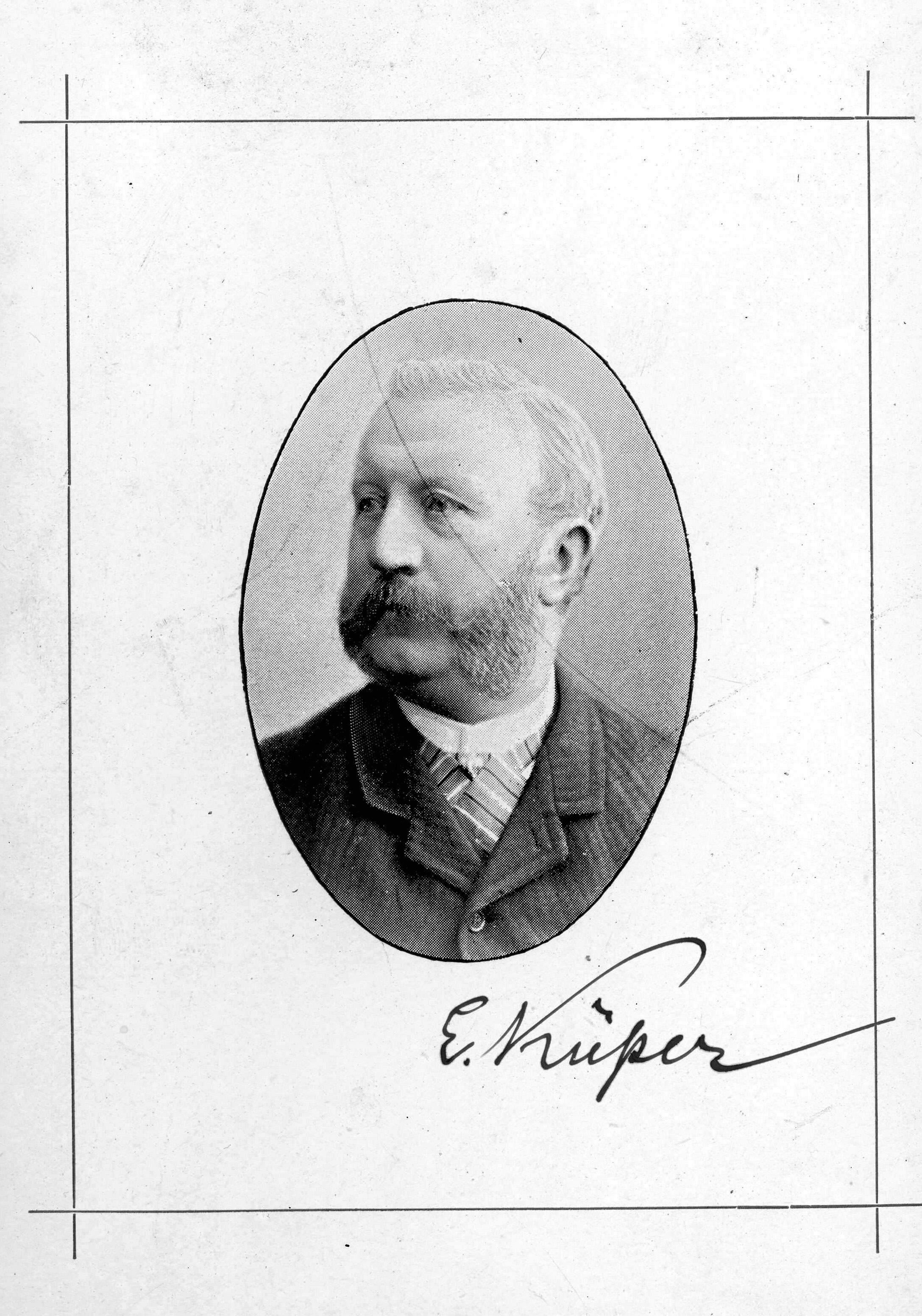 Porträtfotografie von Ernst Küper (1835–1912)